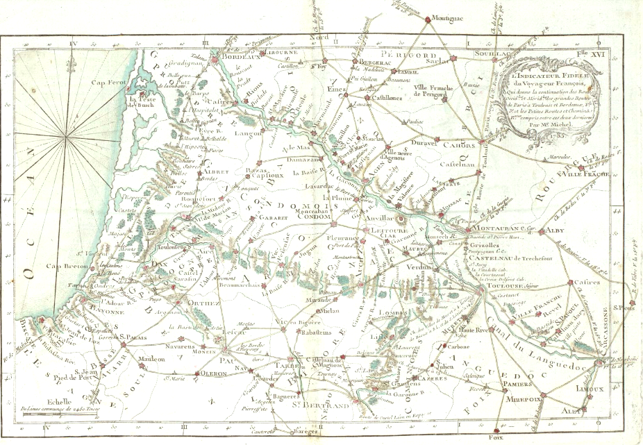 Claude SidoineMichel, L'Indicateur fidèle ou guide des voyageurs, qui enseigne toutes les routes royales, 1785 ː planche XVI, routes occidentales et méridionales.